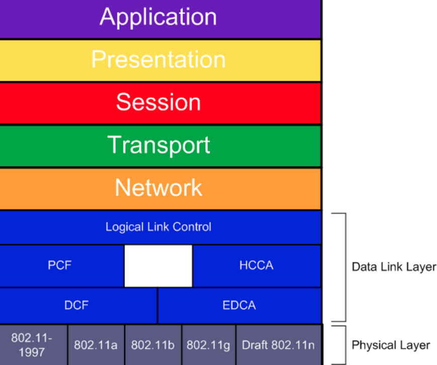 Couches OSI